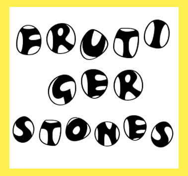 Exemple de Frutiger Stones